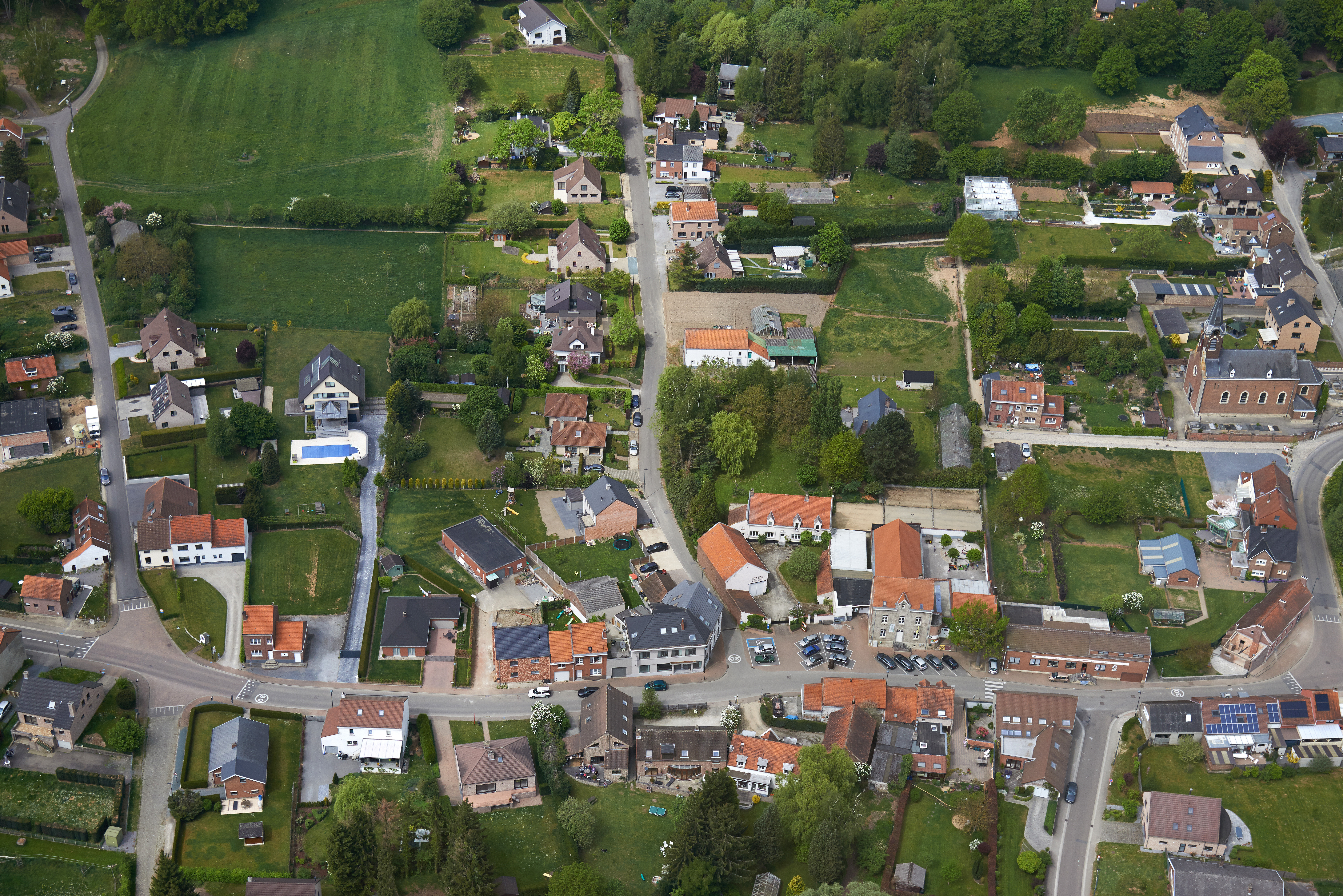 Luchtfoto van omgeving rond het Arthur Michielsplein en de Kardinaalstraat, Terlanen, België. Kijkrichting Noord-West